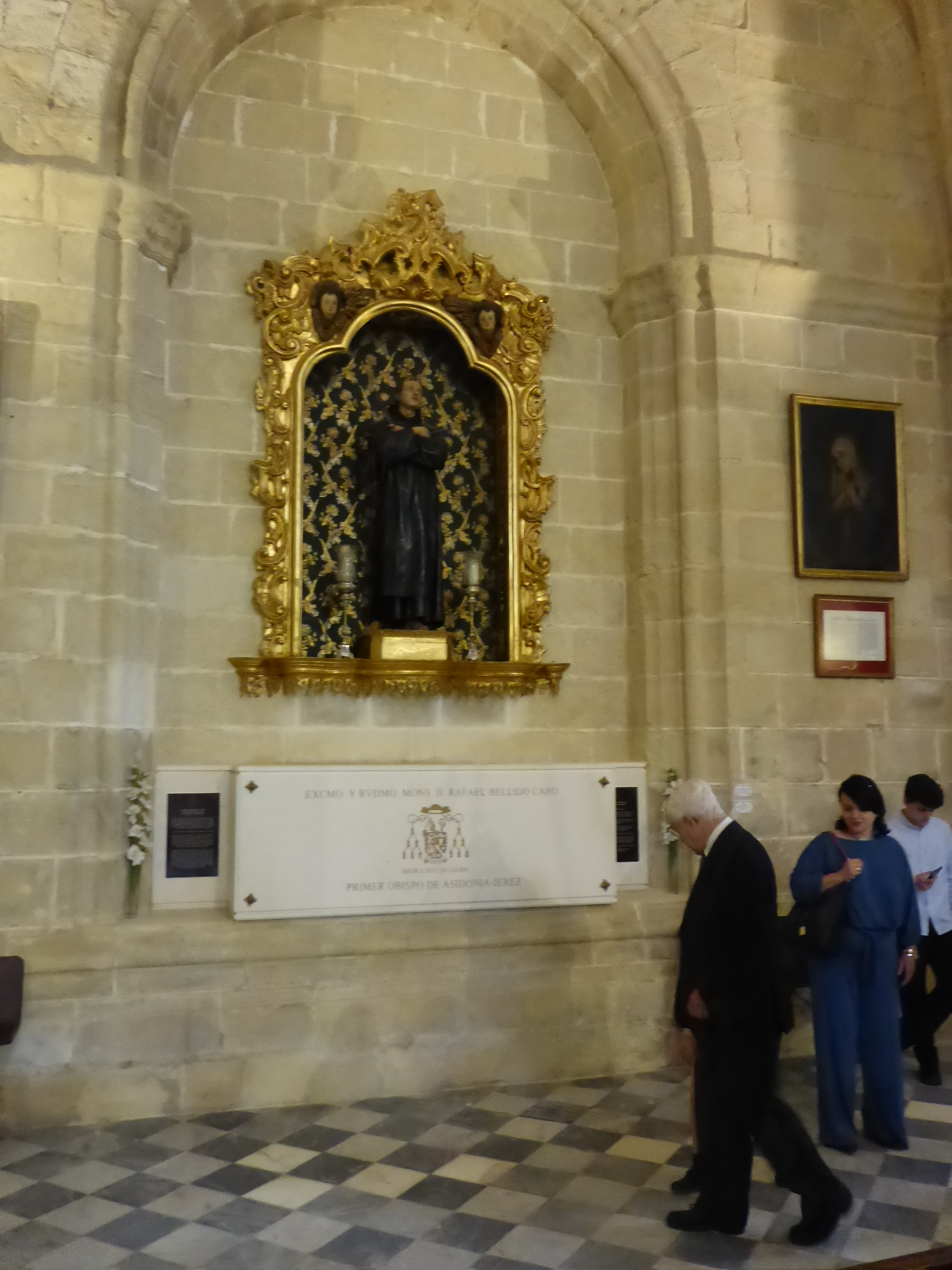 Tumba del Obispo Rafael Bellido Caro en la Catedral de Jerez de la Frontera